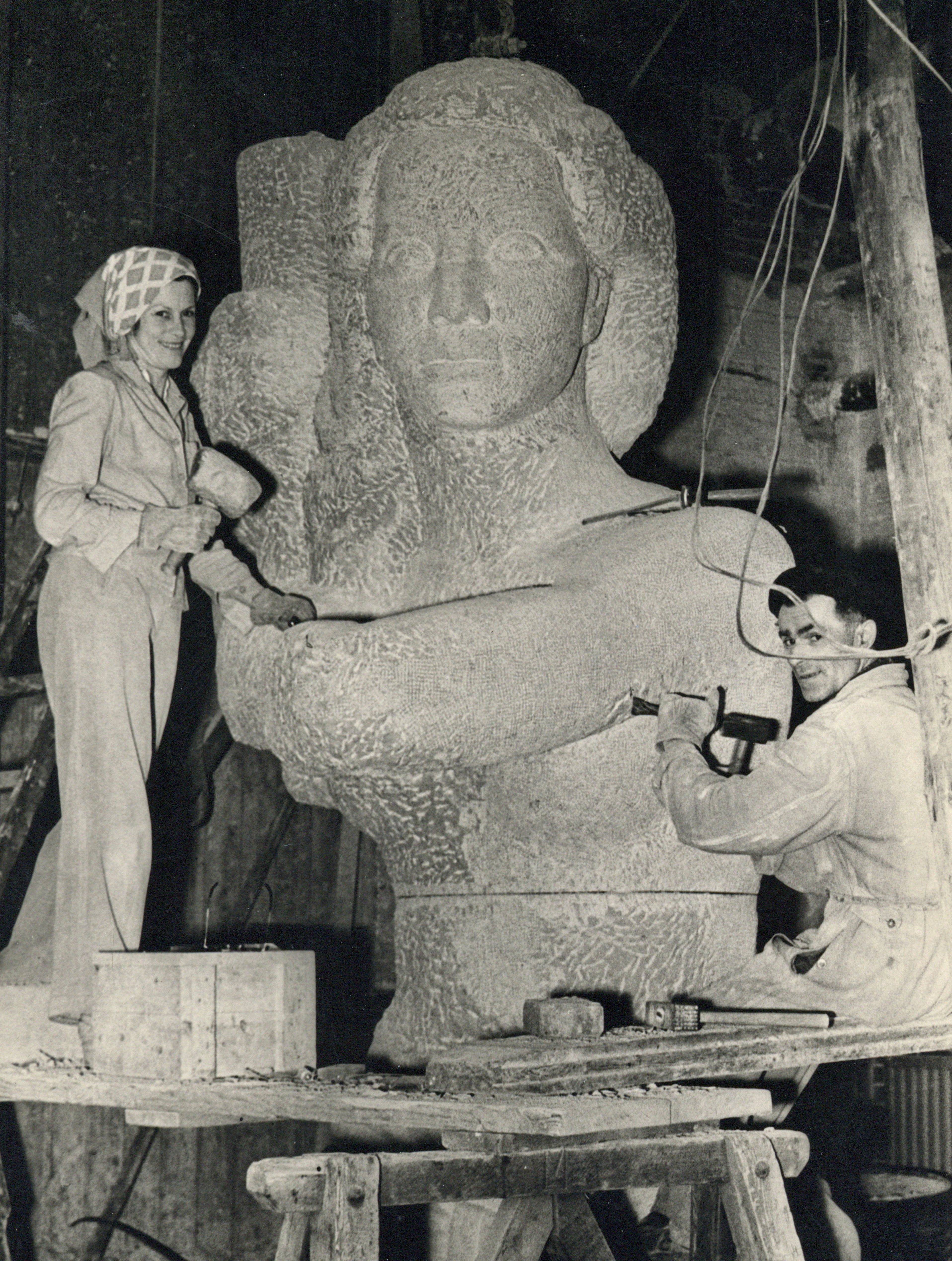 Afbeelding van de beeldhouwster Corinne Franzén-Heslenfeld (links) tijdens het kappen van het Verzetsmonument (bestemd voor het Domplein te Utrecht) in haar atelier in Den Haag. N.B. Het atelier was een voor de gelegenheid geïmproviseerde ruimte in het ketelhuis van de Haagse gasfabriek.